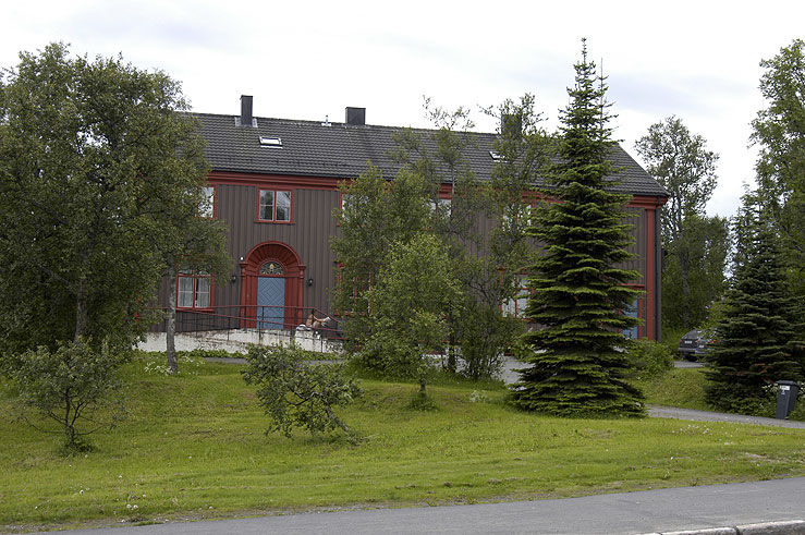 Bispegården i Tromsø sett fra Haakon VIIs gate. Foto: Krister Brandser